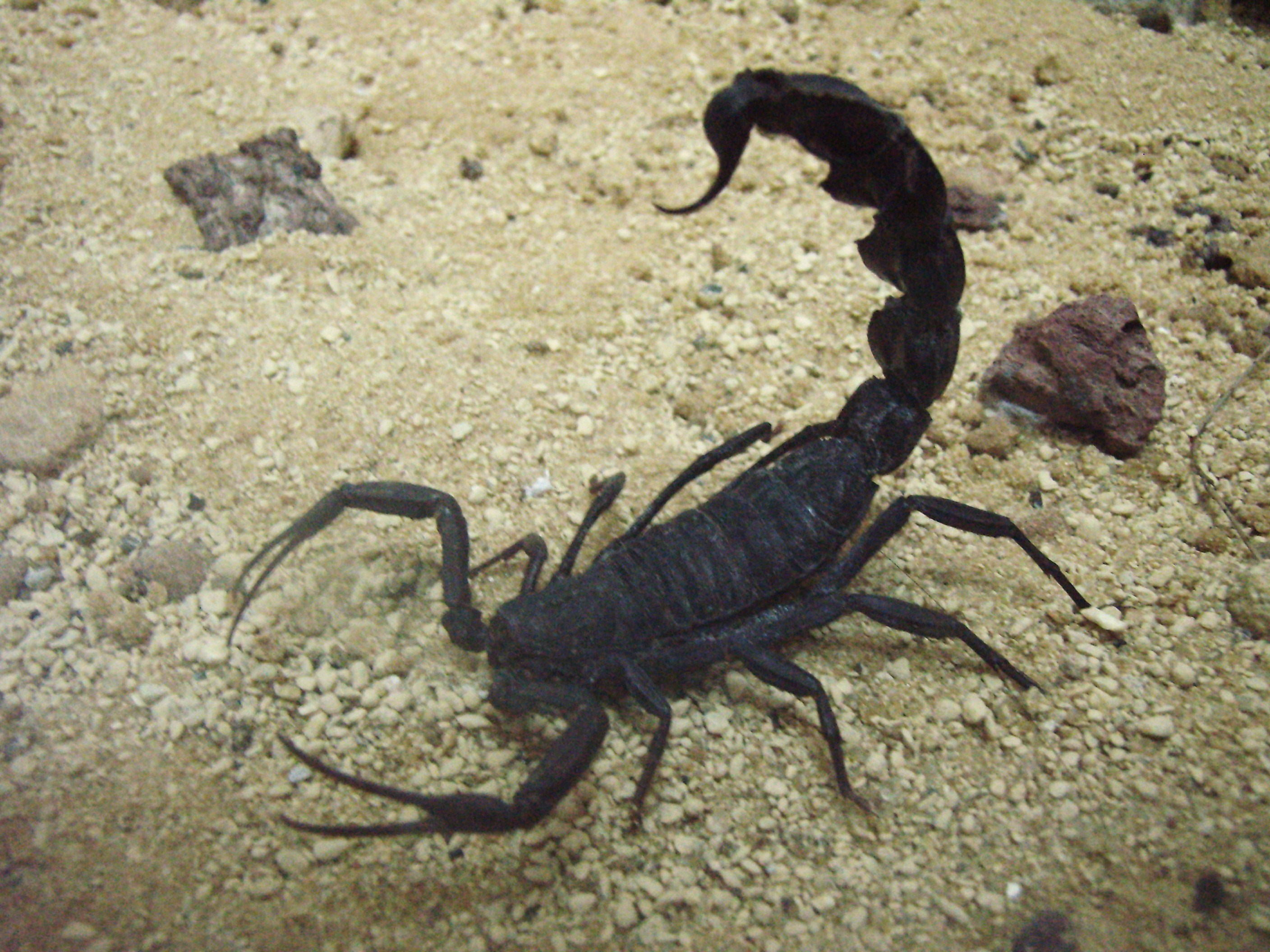 קטלן דו גווני. רישיון נוצר על ידי משתמש:Androctonus